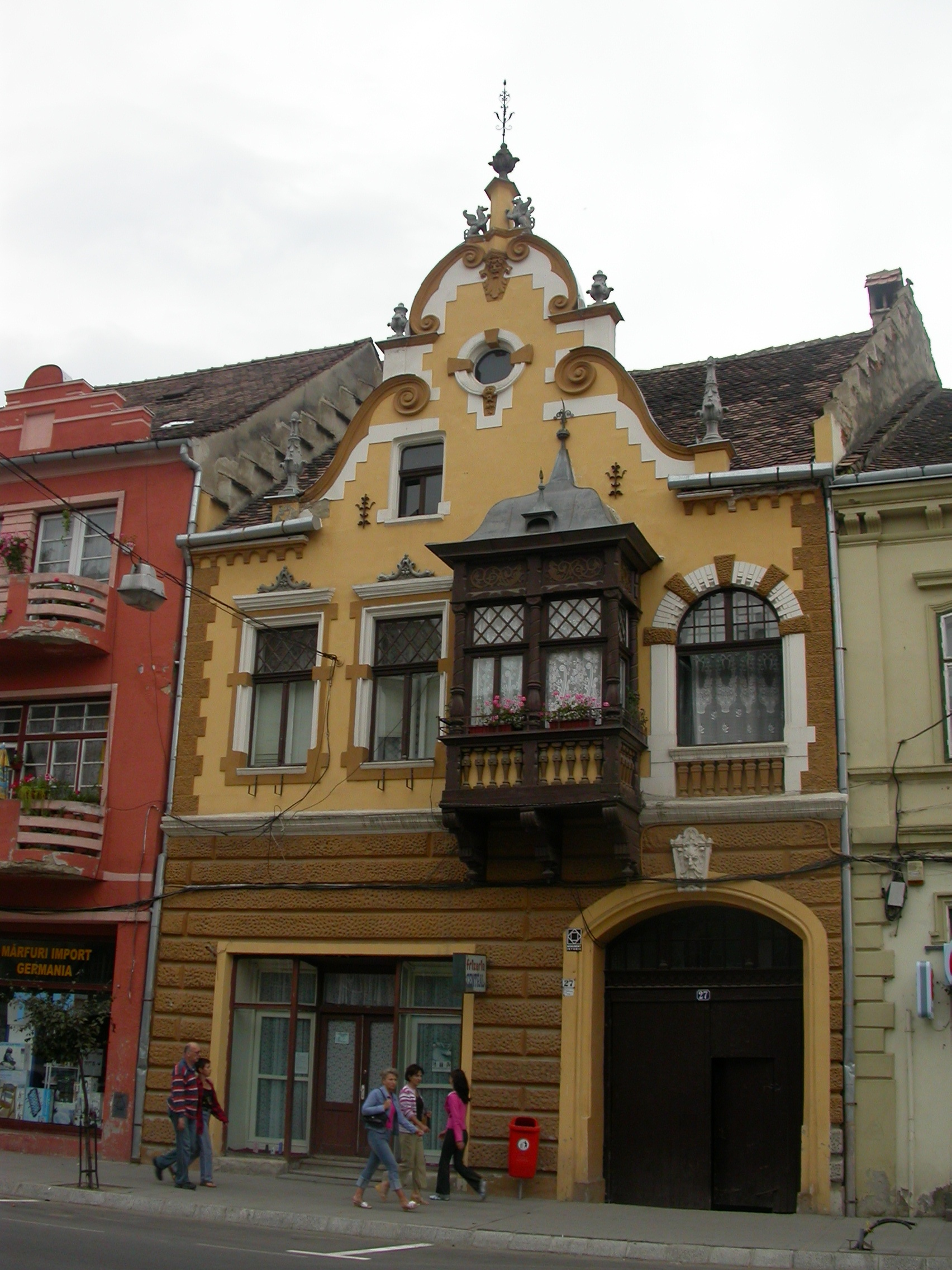 Casă, sf. sec. XIX